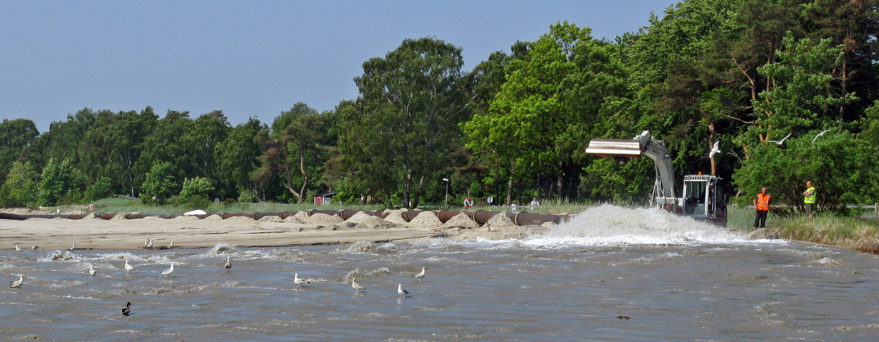 Sandfodring vid Ystad Saltsjöbad 2011.